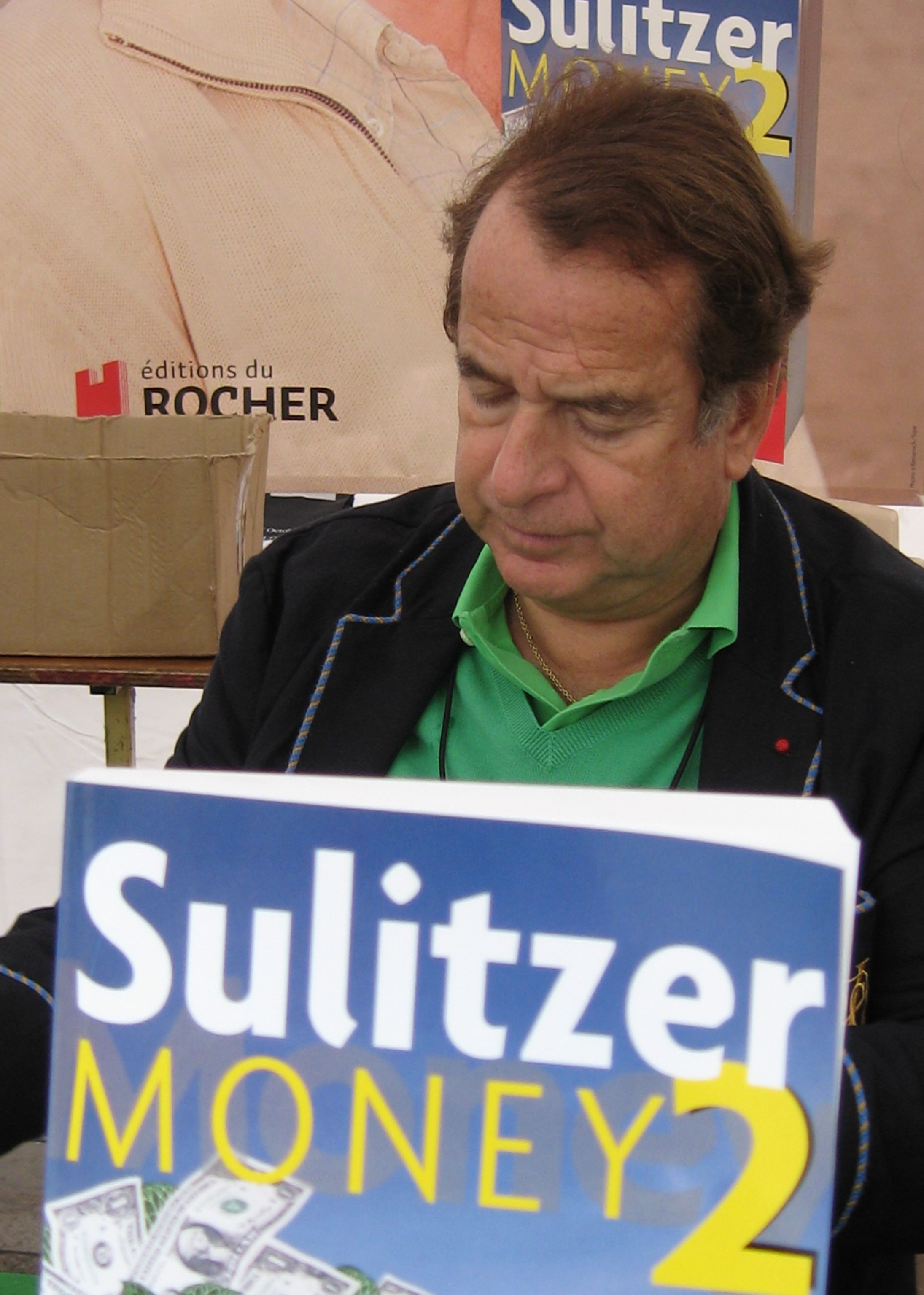 Paul-Loup Sulitzer, La Grande Motte, "Les Pyramides du livre", 9 mai 2010.